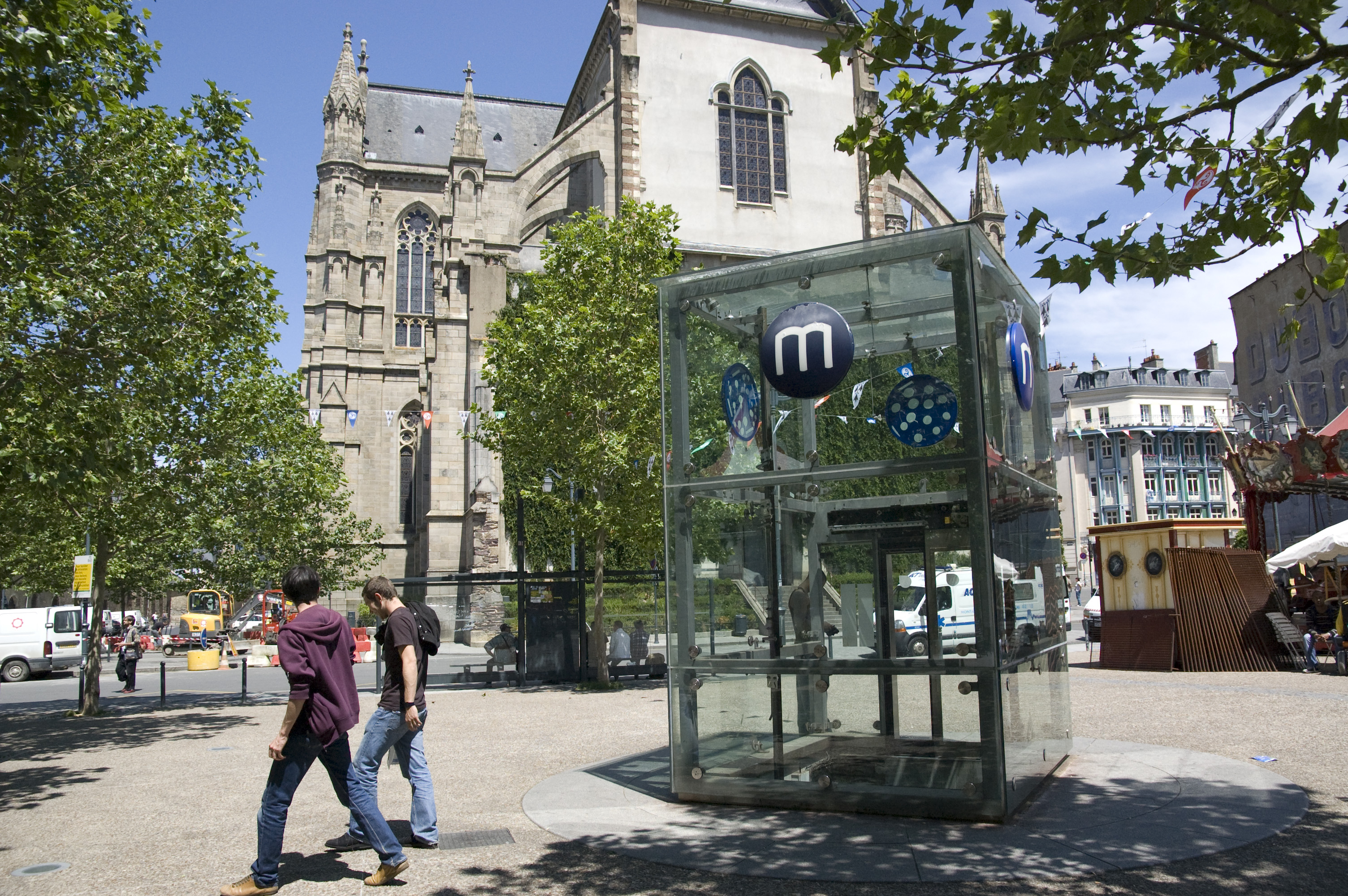 Station de métro Sainte-Anne et façade de l’église Saint-Aubin à Rennes.